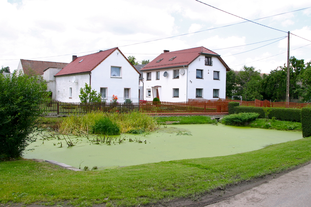 Ogiernicze (dodatkowa nazwa w j. niem. Legelsdorf) – wieś w Polsce położona w województwie opolskim, w powiecie prudnickim, w gminie Biała.